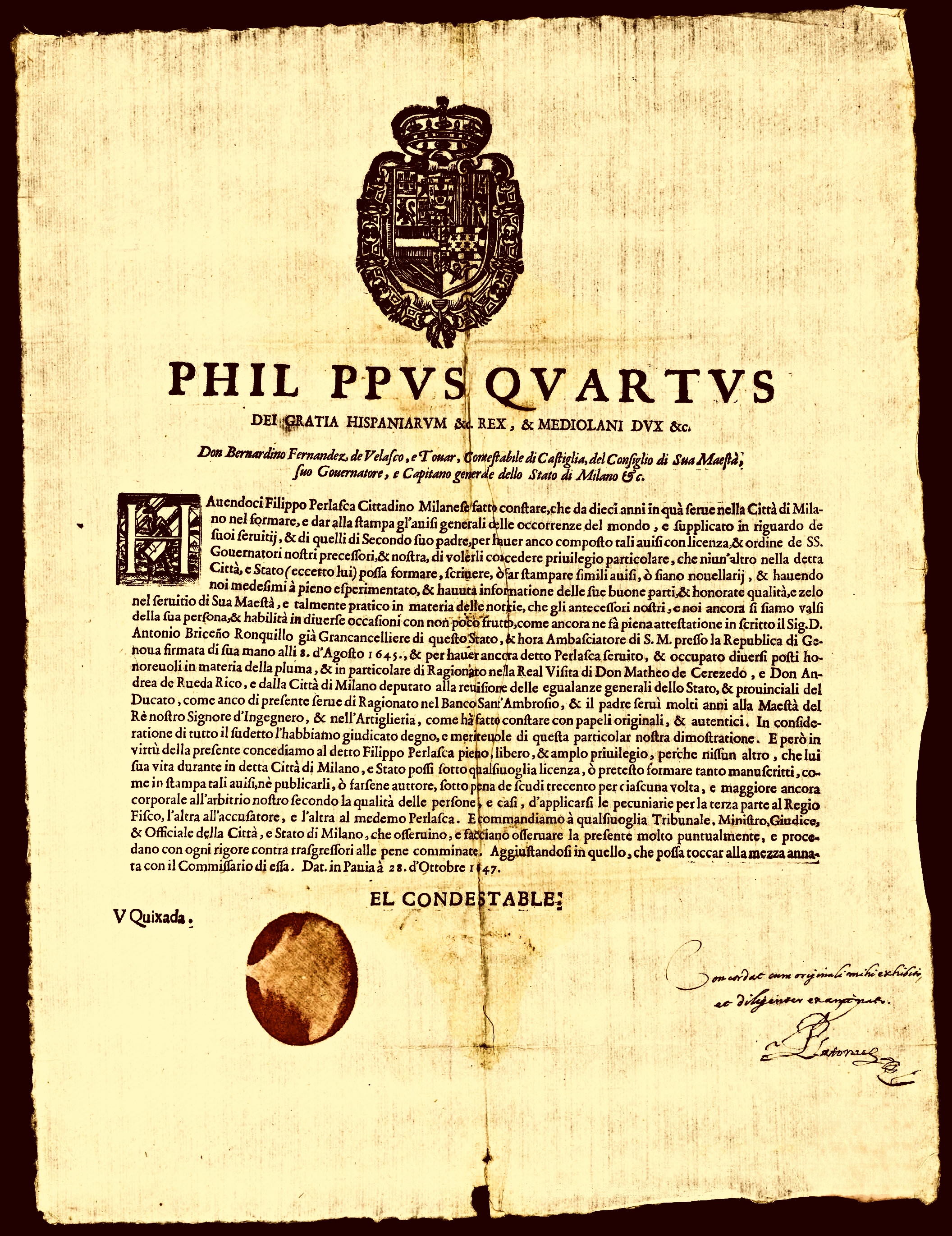 España. Rey (1621-1665: Felipe IV) Firmado de puño y letra por el Condestable Marco Antonio Platoni: en latín "Concordat cum originali mihi exhibit et diligenter examitus" Firma de Platonus. Materia / geográfico:Perlasca, Filippo